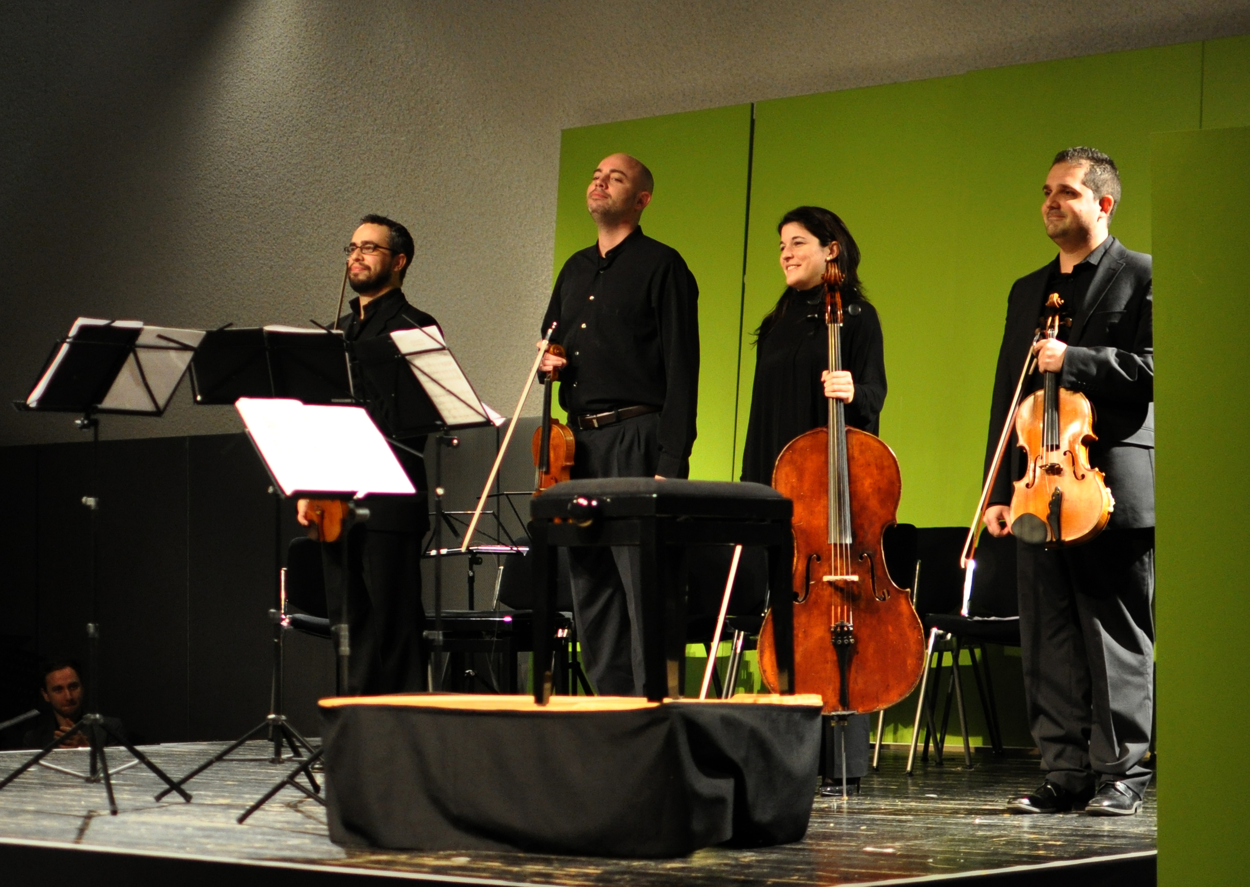 Cuarteto Quiroga beim Heidelberger Streichquartettfest des Heidelberger Frühlings, 25. Januar 2013. Besetzung: Aitor Hevia, ViolineCibrán Sierra, ViolineJosep Puchades, ViolaHelena Poggio, Violoncello.